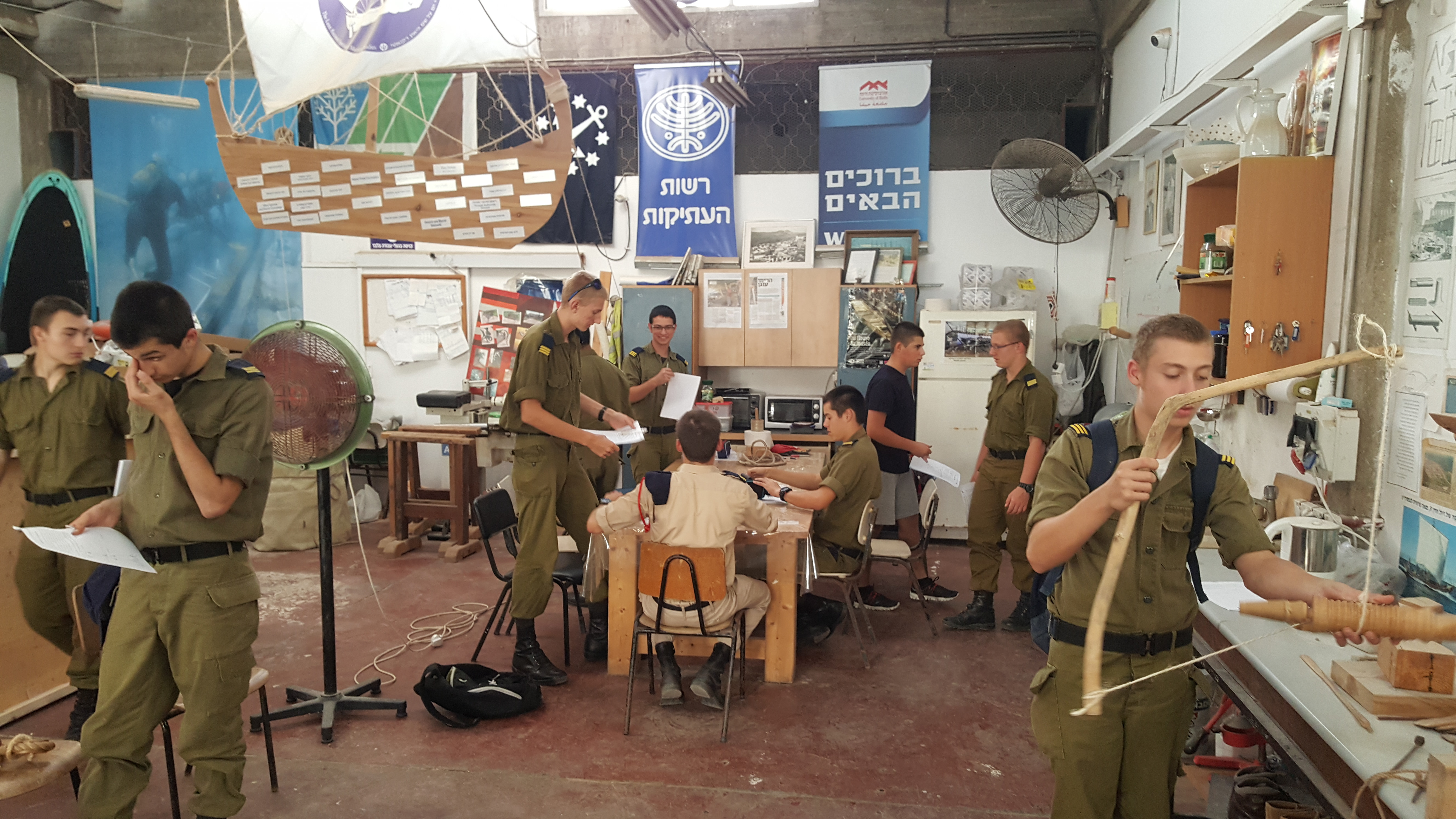 תלמידי בית הספר לקציני ים עכו במגמת מדעי הים, מתנסים בשיטות בנייה עתיקות בחדר המלאכה של בית הספר